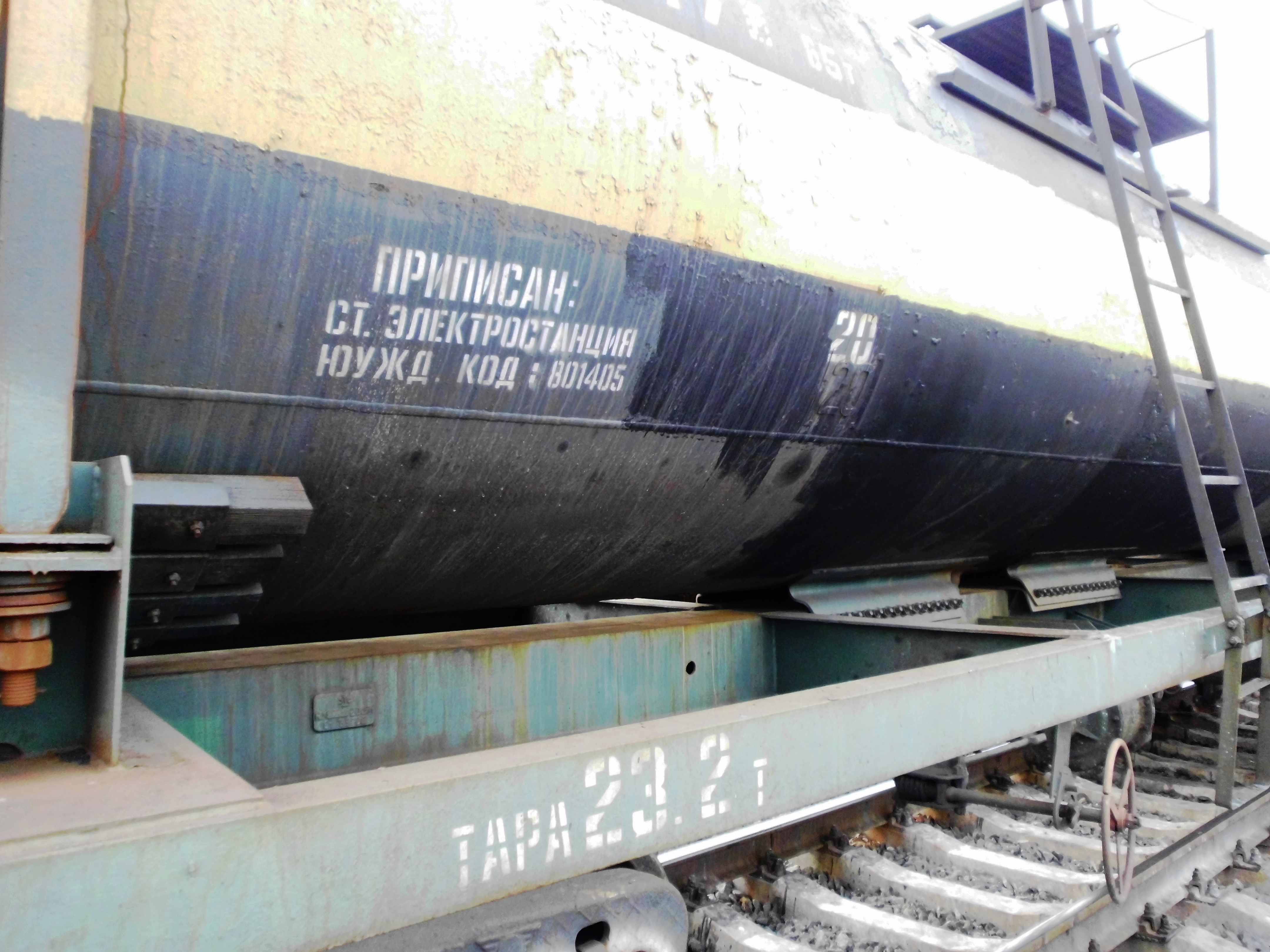 4-х осный вагон-цистерна для серной кислоты с бронелистом. Россия.